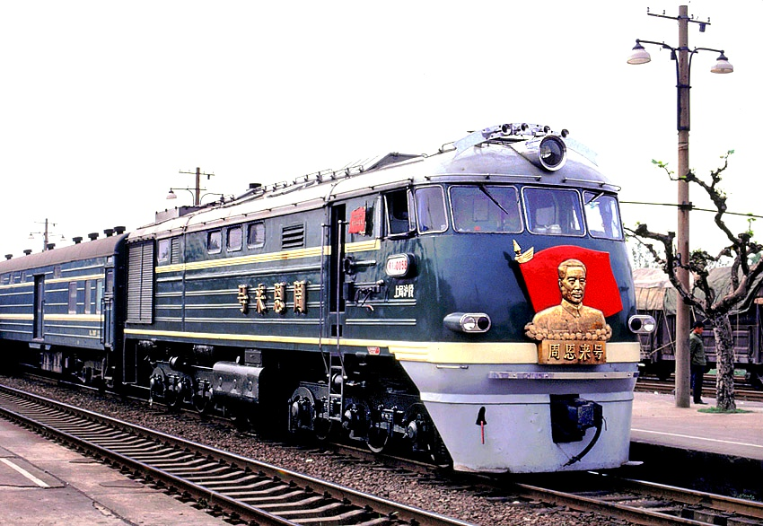 1977年11月，为纪念1976年逝世的中华人民共和国总理周恩来，铁道部经请示国务院，选中上海铁路局上海机务段的东风3型0058号机车命名为“周恩来号”，并于1978年1月5日正式举行命名仪式，由时任中共中央主席华国锋亲笔题写了“周恩来号”四个大字。这是第一代周恩来号机车。